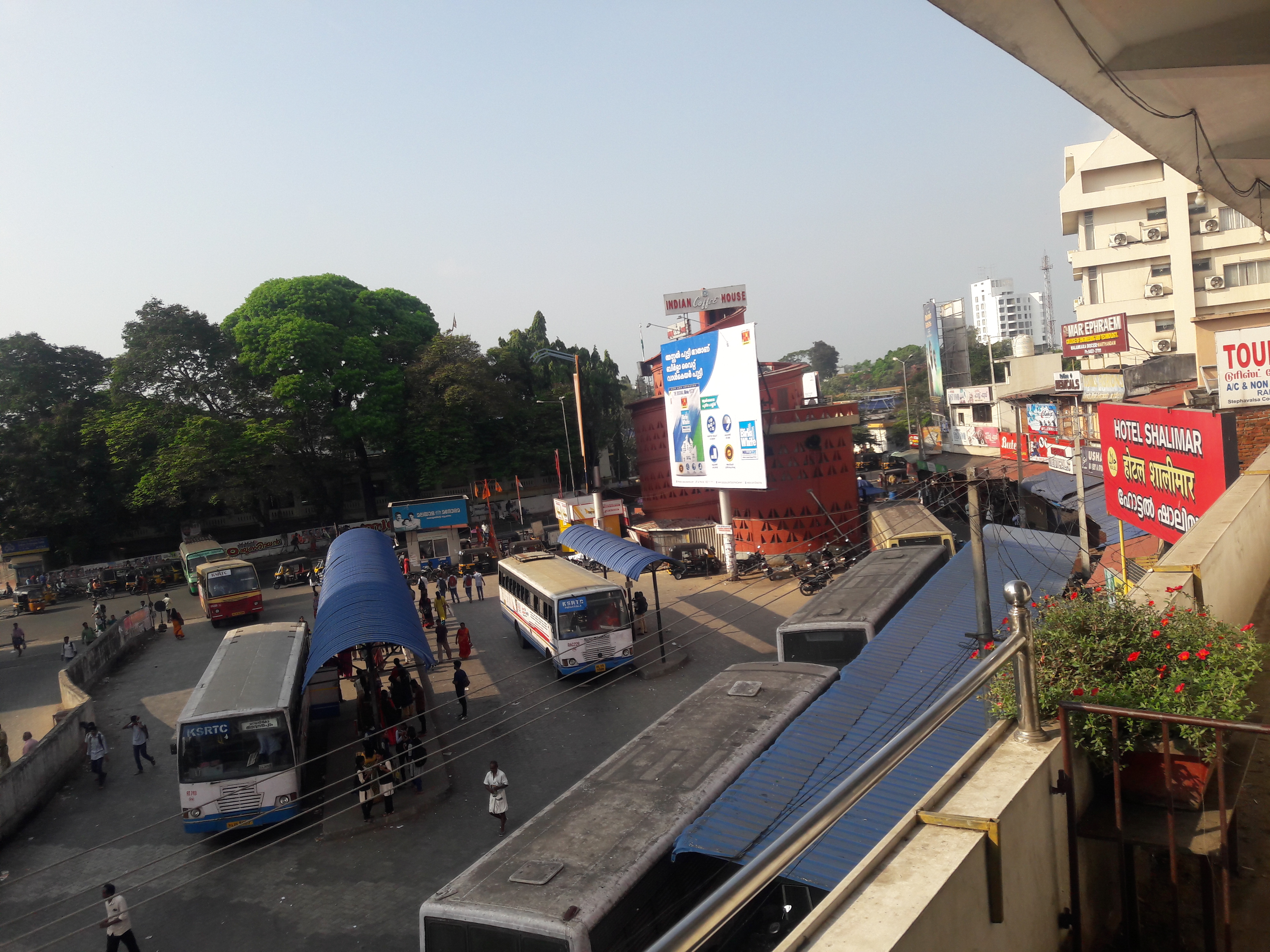 കേരള സ്റ്റേറ്റ് റോഡ് ട്രാൻസ്പോർട്ട് കോർപ്പറേഷൻ തിരുവനന്തപുരം.